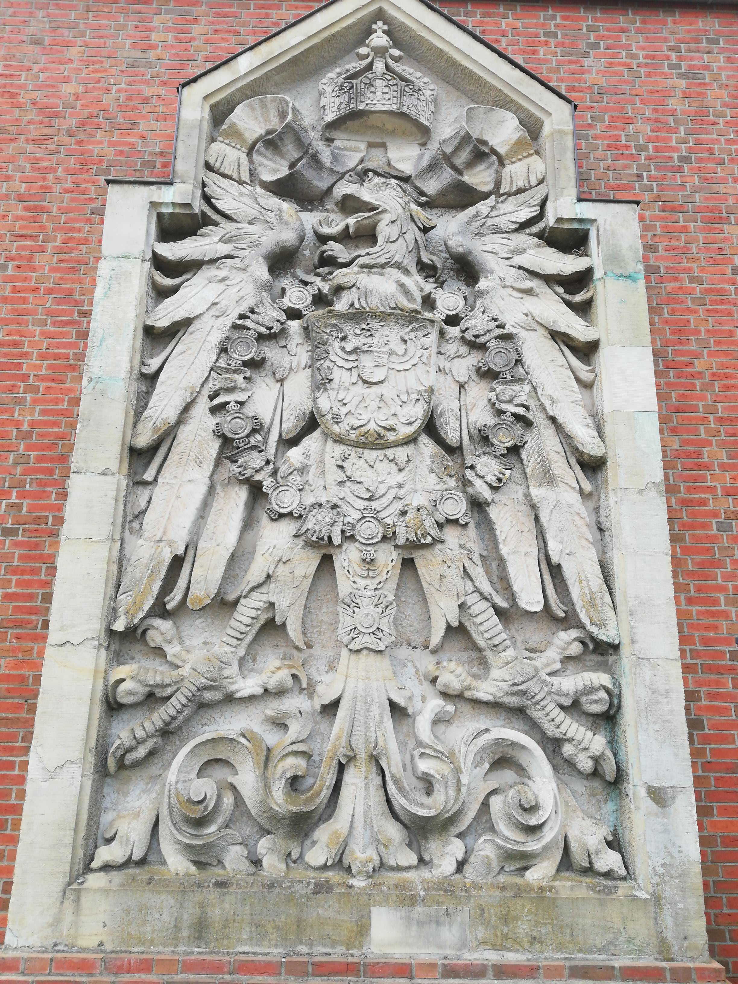 Levensauer Hochbrücke über den Nord-Ostsee-Kanal, Kaiseradler aus Sandstein (Entwurf: Architekt der Brücke Hermann Muthesius), Größe: 3 x 6 Meter, die ursprünglich 4 Kaiseradler waren zur Verziehrung an den Außenwänden der Portale der Hochbrücke angebracht. Sie wurden im Rahmen des Abbruchs der Portale nach dem 2. Weltkrieg entfernt und 1995 auf dem Schleusengelände in Holtenau aufgestellt.